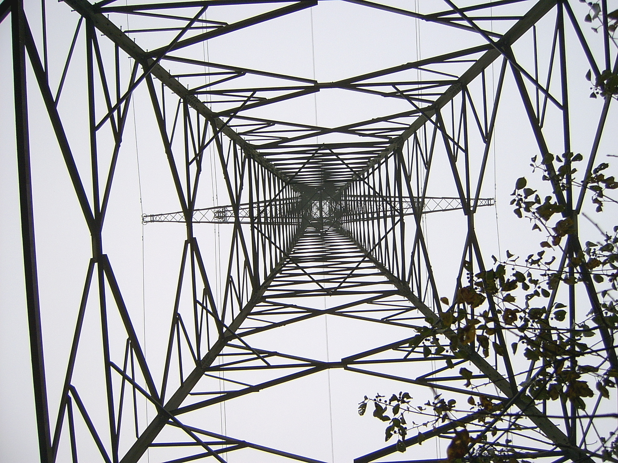 Ein Hochspannungsmast (Tragmast, Typ: Donaumast) von unten aus gesehen – Mast Nr. 69 der Hochspannungsleitung Schwandorf–Regensburg in Teublitz.